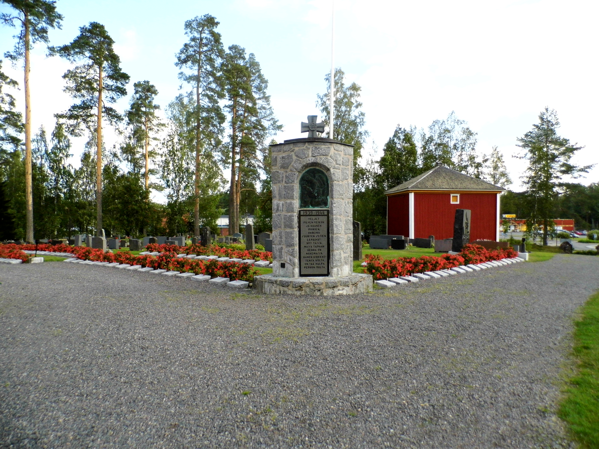 Perhon kirkko, sankarihautausmaa muistomerkkeineen